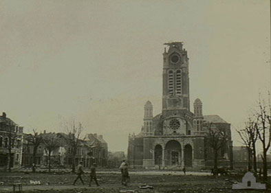 A belgiumi Armentières város főtere és a Notre Dame d'Armentieres templom az 1918. április 10-i német tüzérségi támadás után